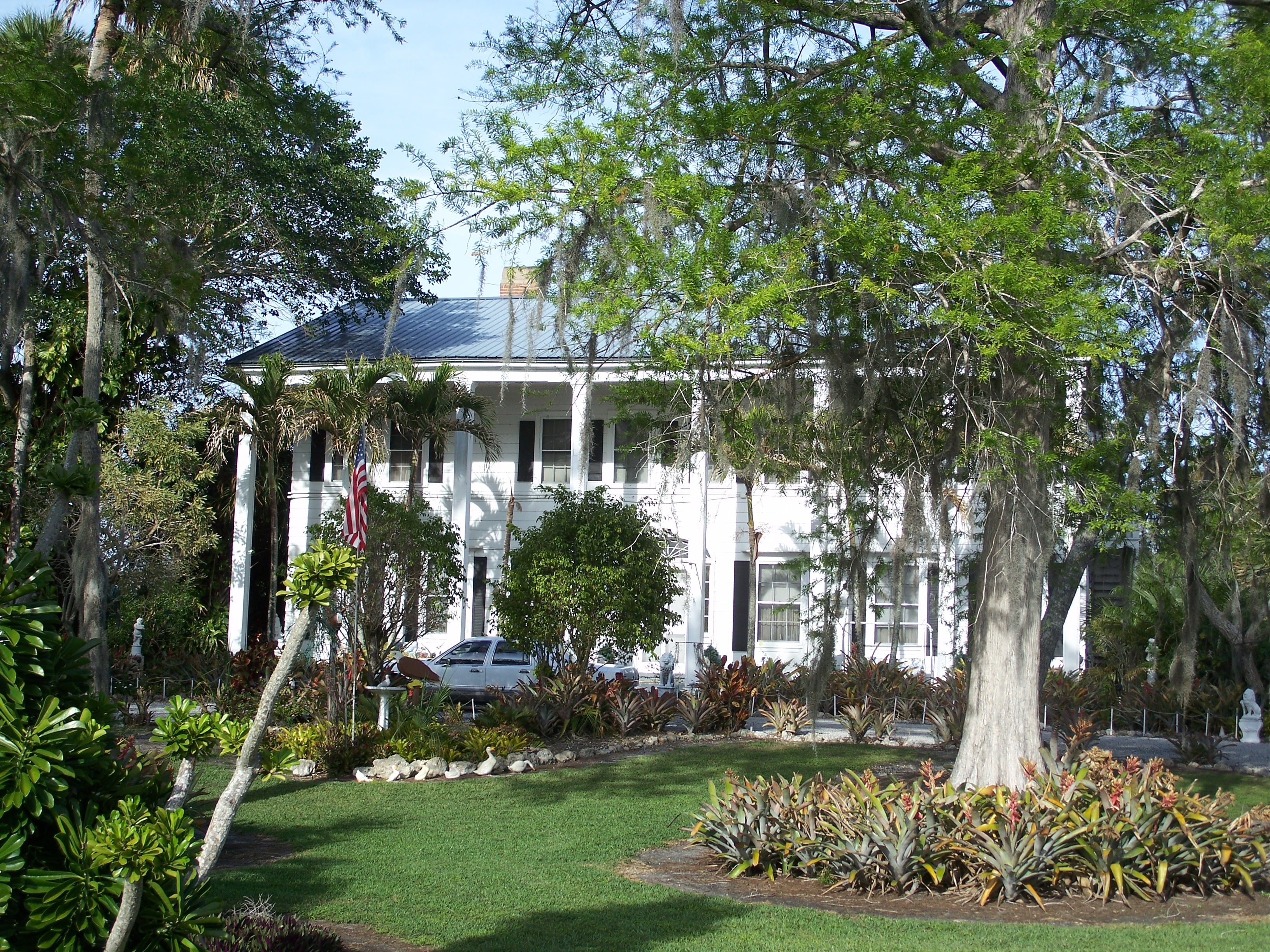 Port Mayaca, Florida: Cypress Lodge